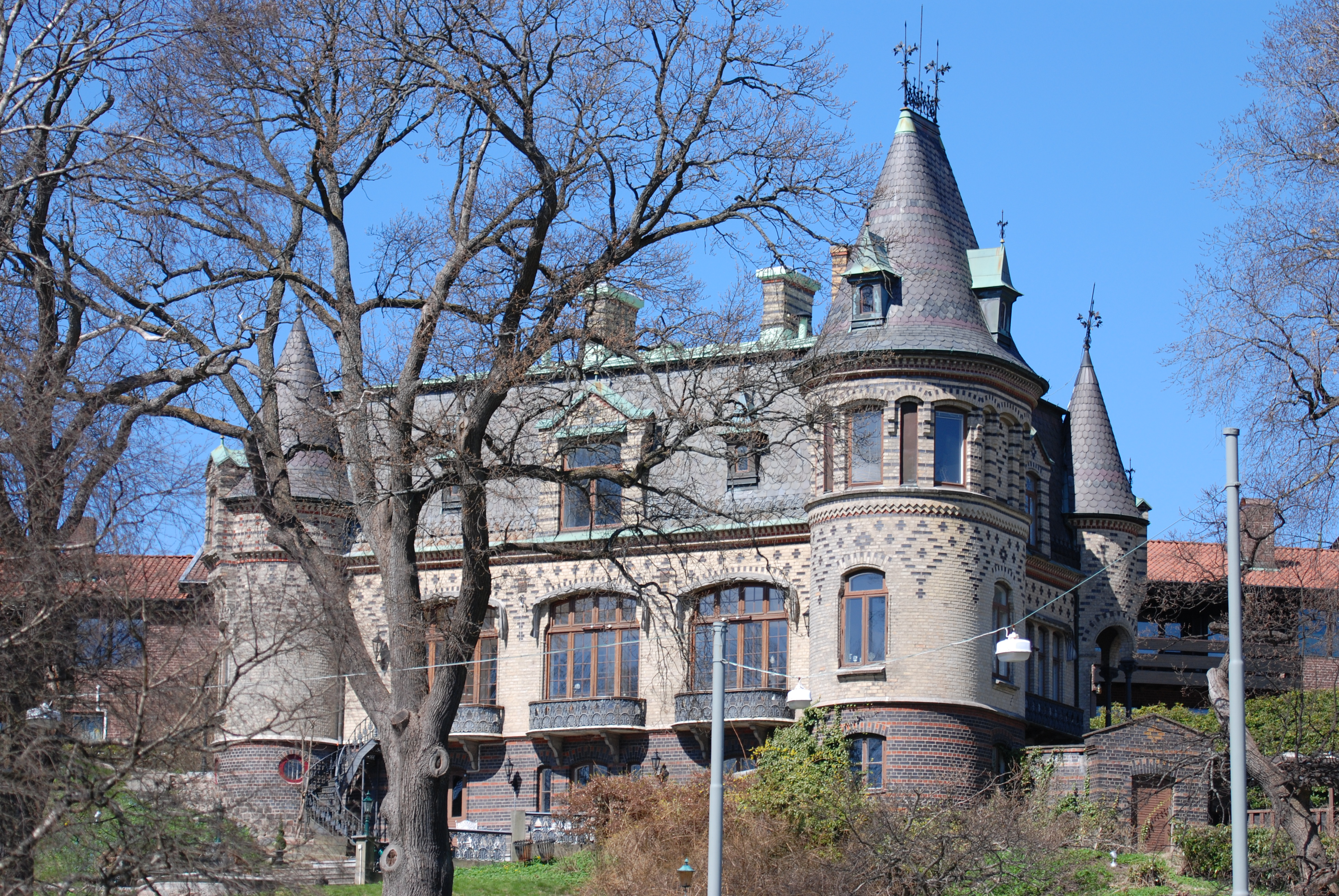 Wilhelmsberg vid Sankt Sigfrids Plan i Göteborg.